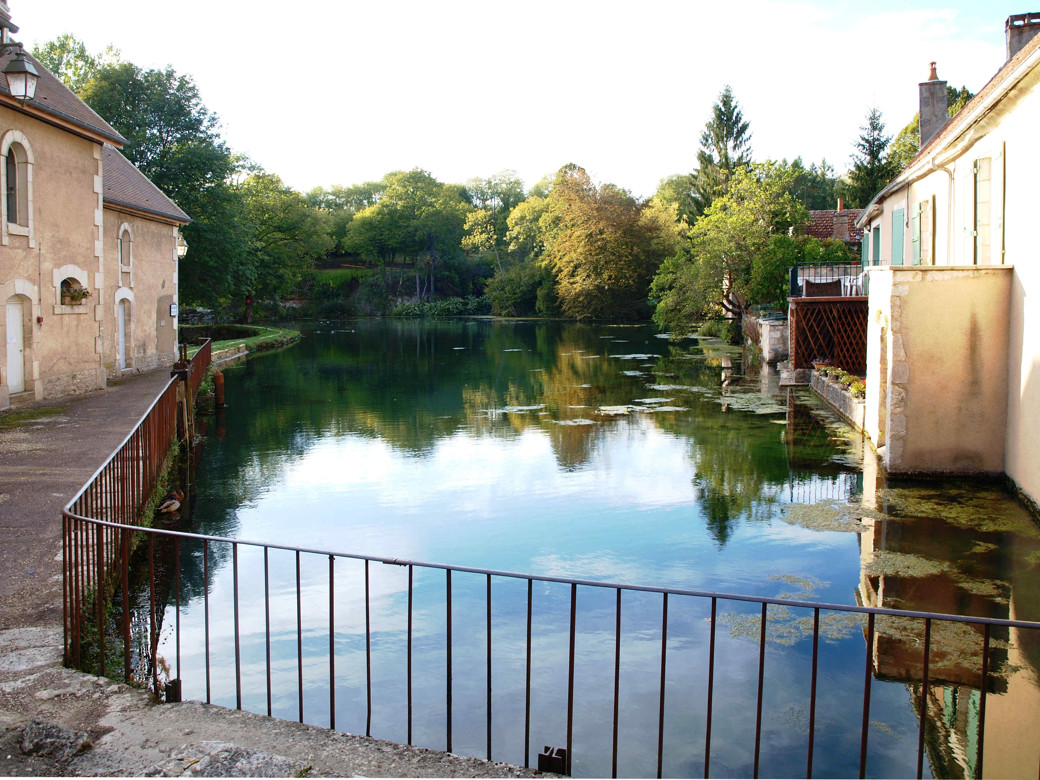 Druyes-les-Belles-Fontaines (Yonne, France)